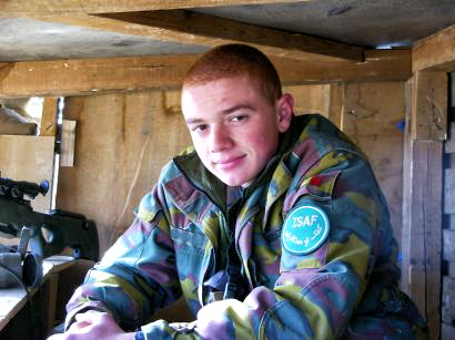 Belgisch ISAF-militair. Eigen foto Paul Hermans 5 mrt 2004 00:56 (CET)